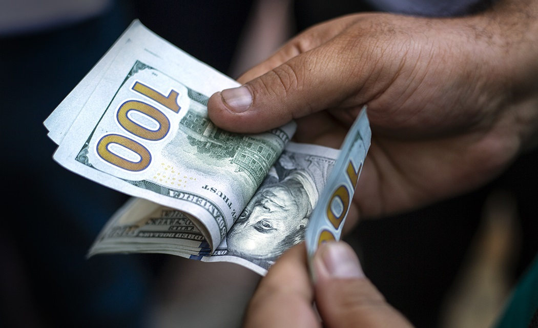 چند صد دلاری